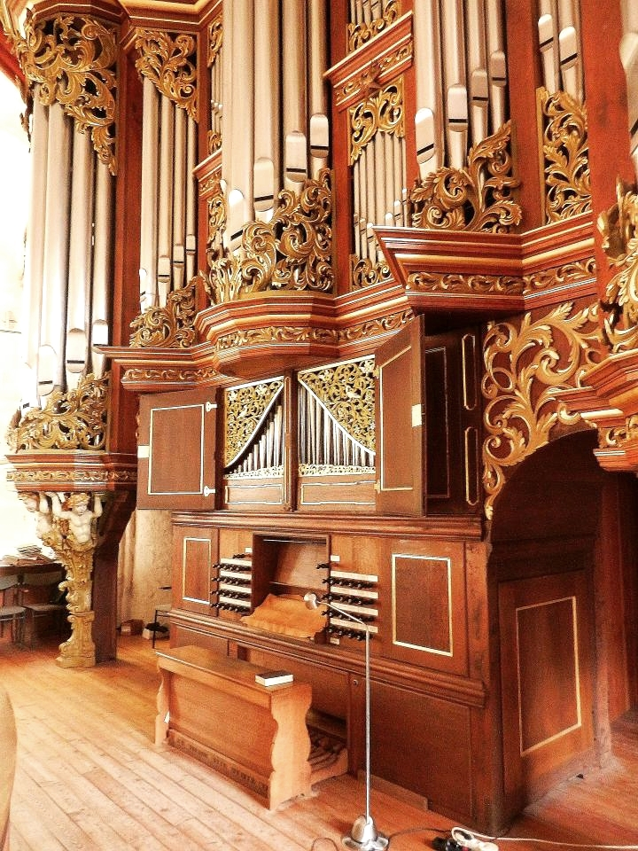 Orgel von St. Wilhadi, Stade, Spieltisch